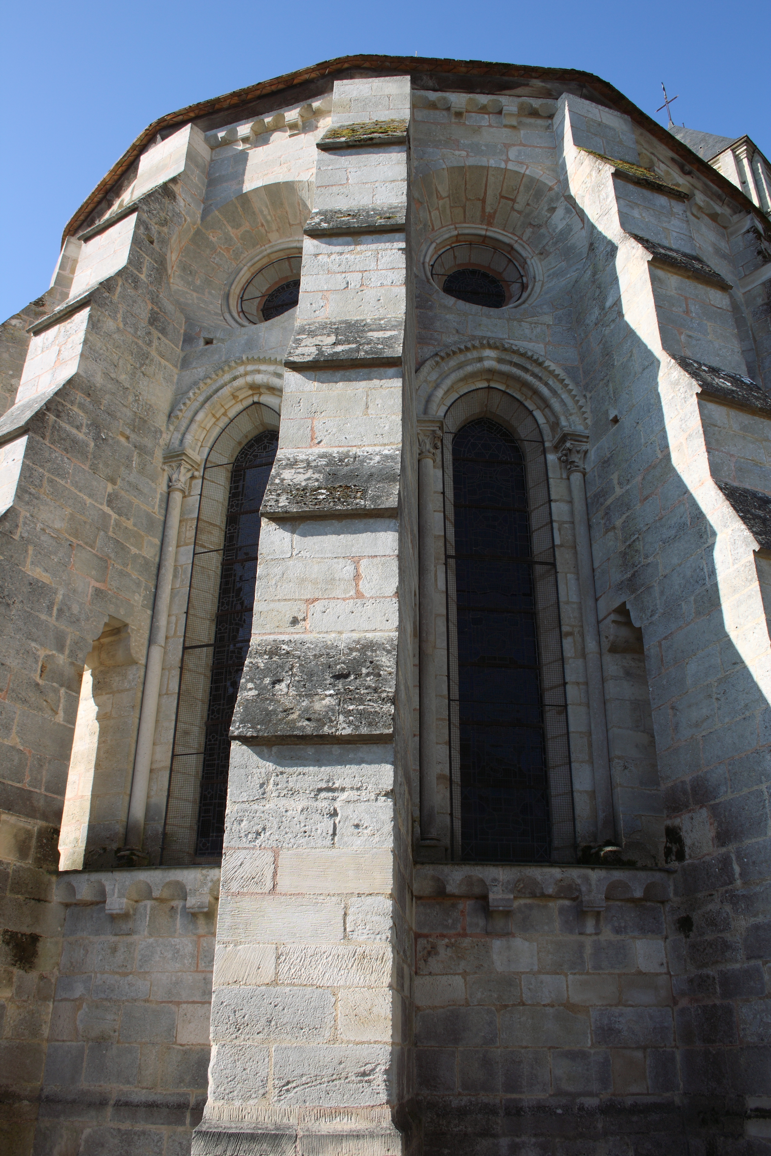 Kirche Notre-Dame in Vétheuil